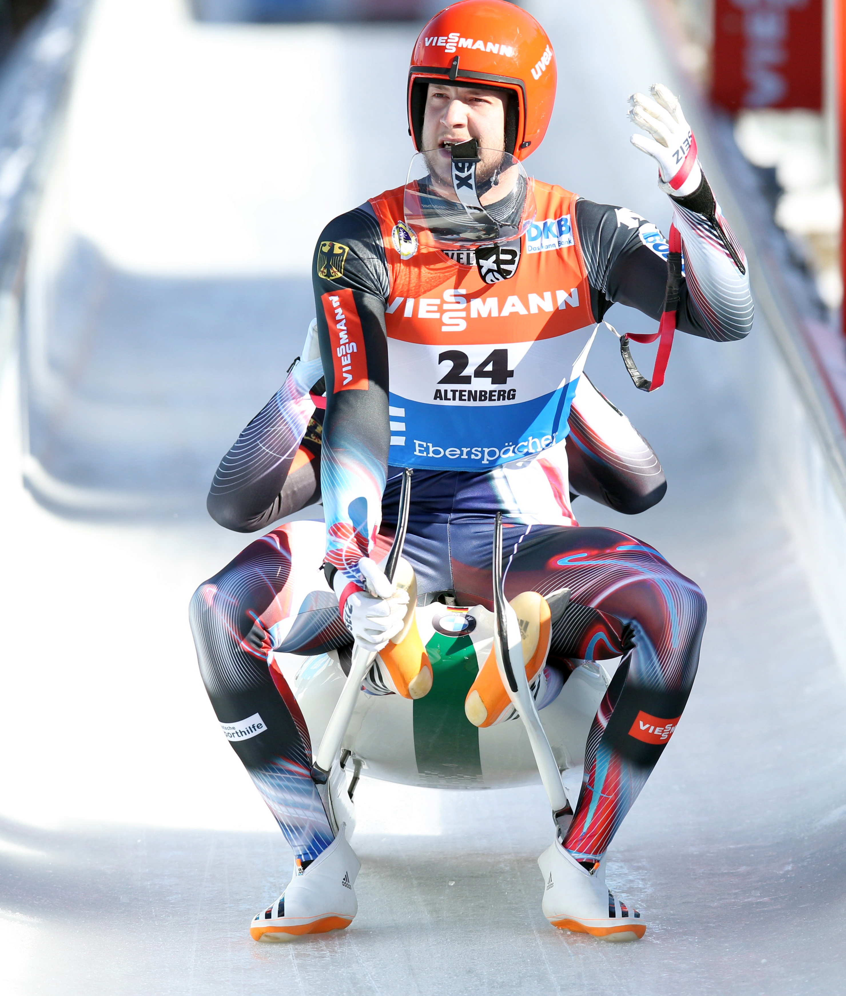 Robin Johannes Geueke und David Gamm beim Rennrodel-Weltcup der Doppelsitzer in Altenberg 2017